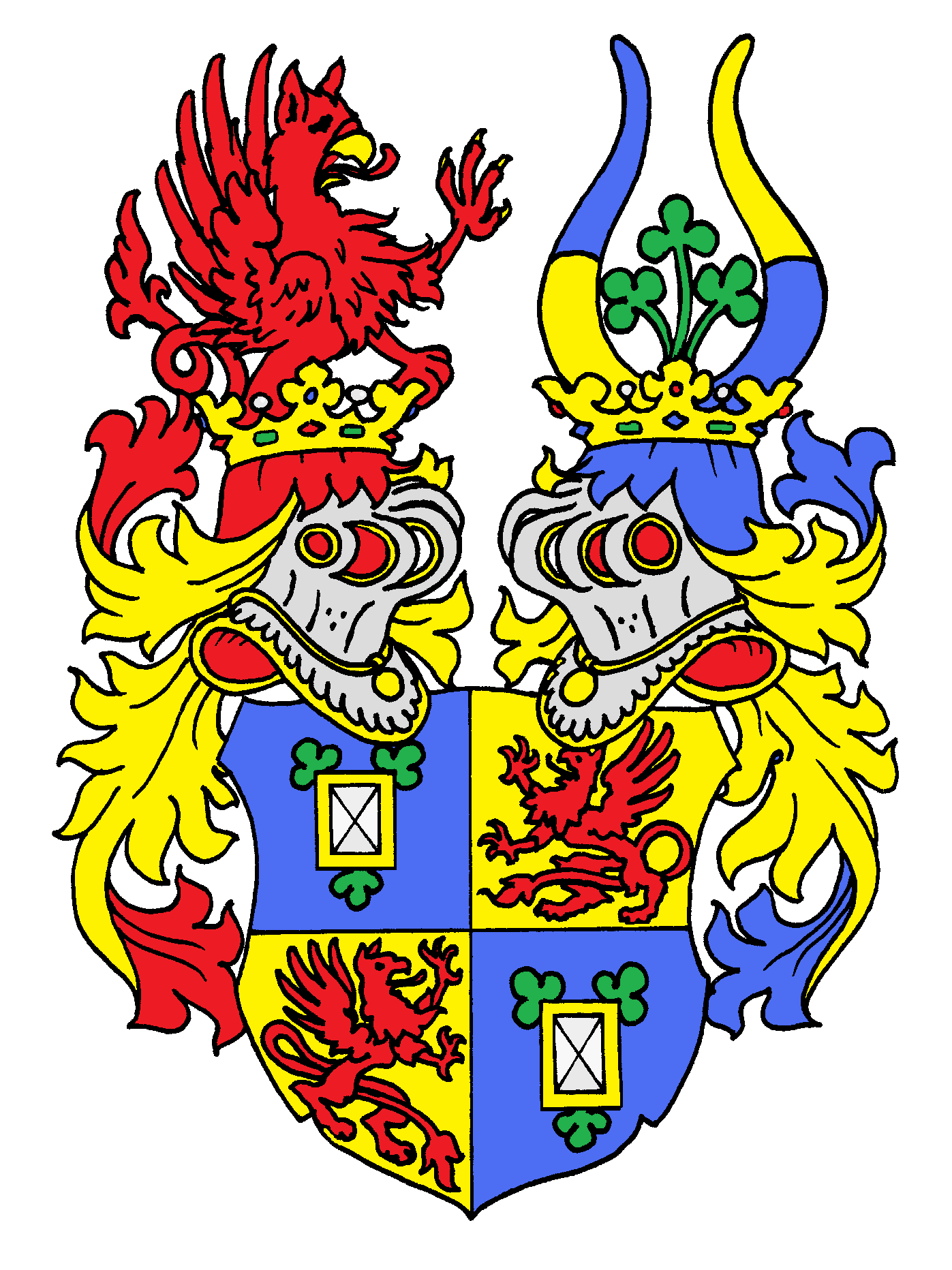 Wappen der Corswant, einer deutschen Adelsfamilie aus Vorpommern. Die Familie erscheint zuerst mit Nykolaus Kuriswantz, der im Jahre 1393 nach Greifswald kam. Mit Peter Corswant († 1507), Ratsherr in Greifswald und 1501 Beisitzer des dortigen Stadtgerichts, beginnt die ununterbrochene Stammreihe. Das Wappen von 1698 zeigt einen gevierten Schild: 1 und 4 in Blau ein rotes, mit schwebendem silbernen Schrägkreuz bezeichnetes Viereck (weißer Saphir), dessen goldener Rand oben an den beiden Ecken und unten in der Mitte mit je einem grünen Kleeblatt beseitet ist; 2 und 3 in Gold ein einwärtsgekehrter roter Greif. Darüber zwei gekrönte Helme: auf dem rechten mit rot-goldenen Decken der Greif wachsend, auf dem linken mit blau-goldenen Decken zwischen zwei von Blau und Gold übereck-geteilten Stierhörnern drei grüne Kleeblätter.